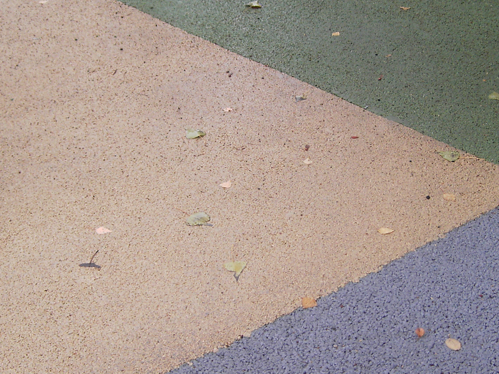 Farbige Asphaltdeckschicht